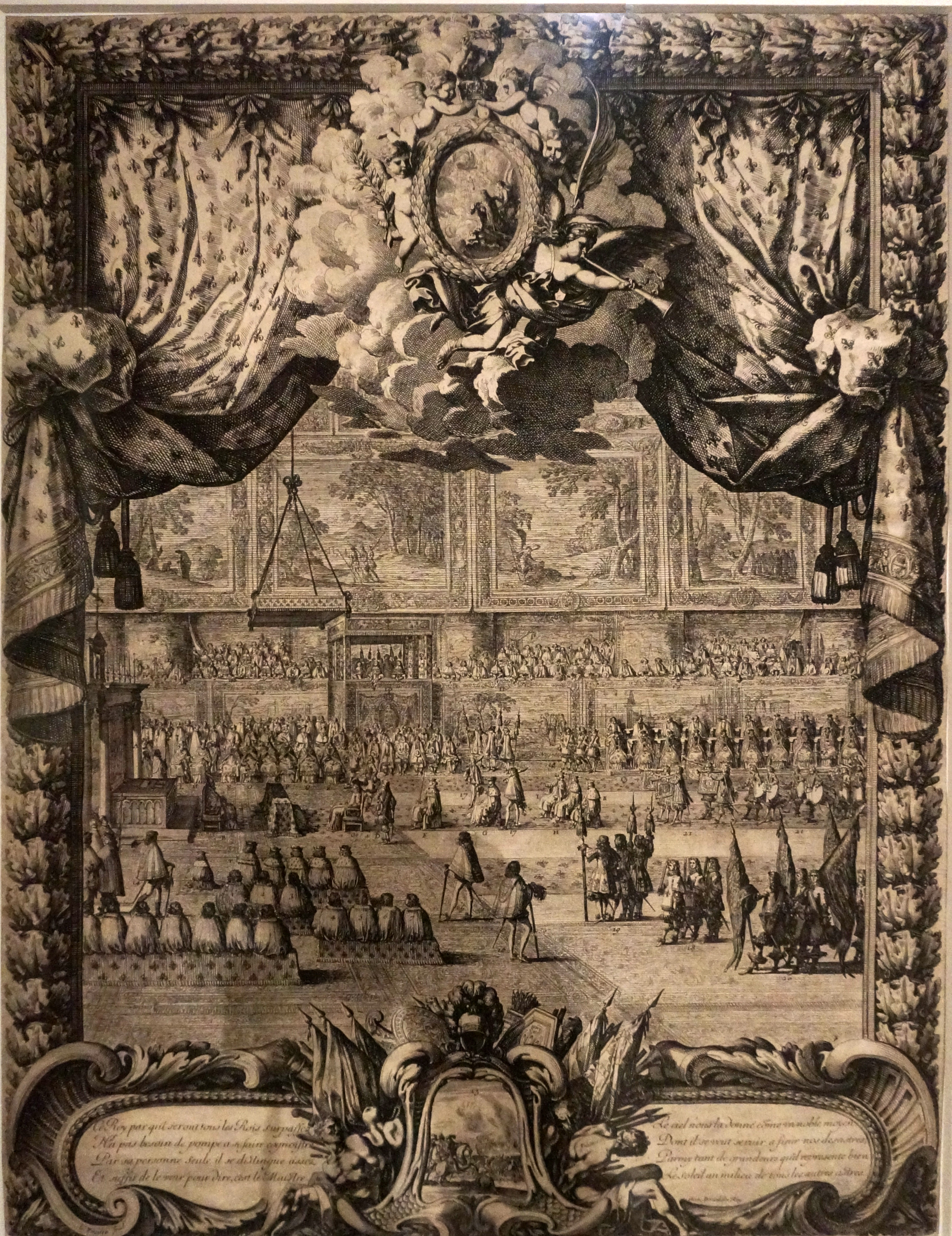 Lors de l' exposition Sacres Royaux, de Louis XIII à Charles.